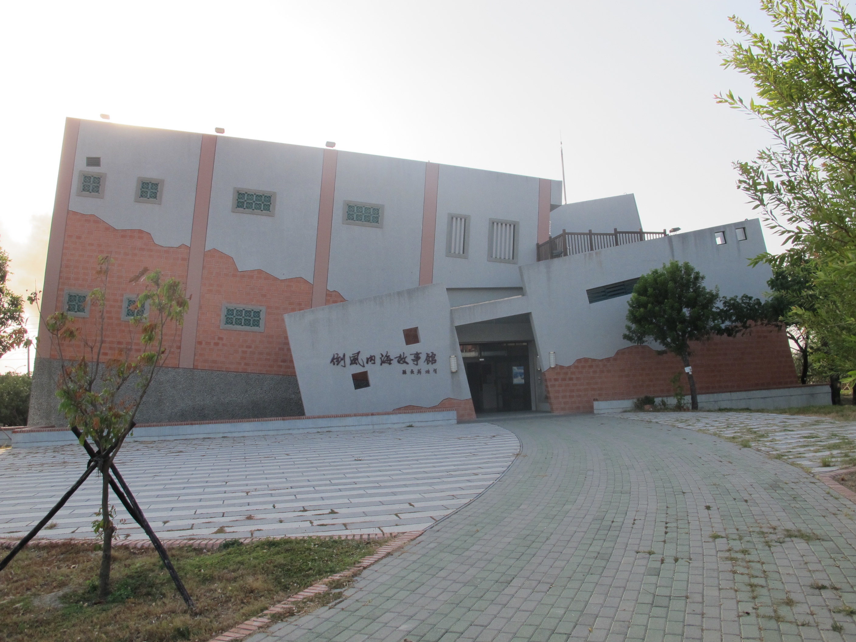 倒風內海故事館